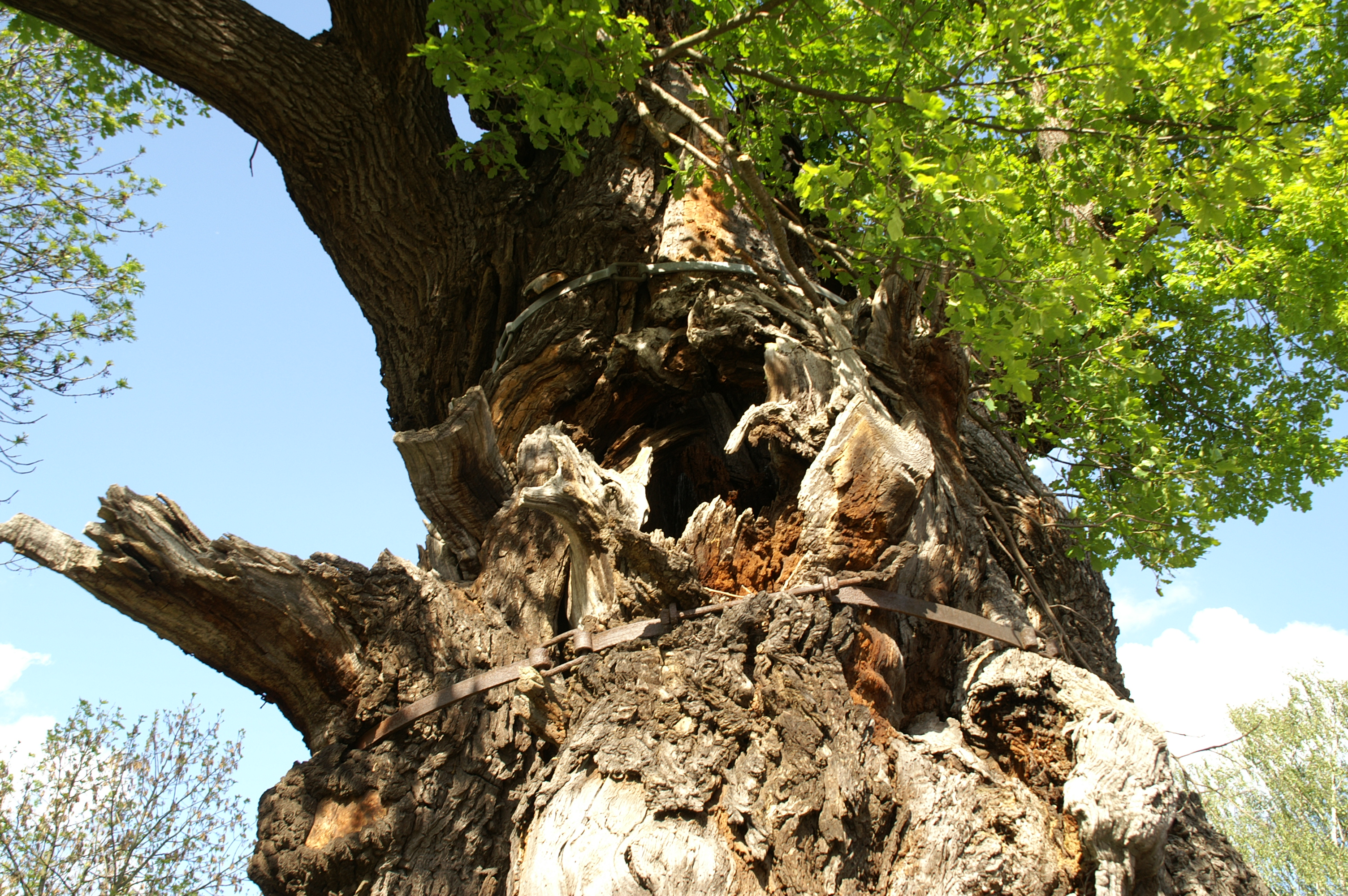 Oak in Noebdenitz, Germany